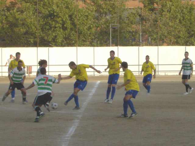 Partido UE Sants vs UE Castelldefels. Camp de la Magòria (la Bordeta)